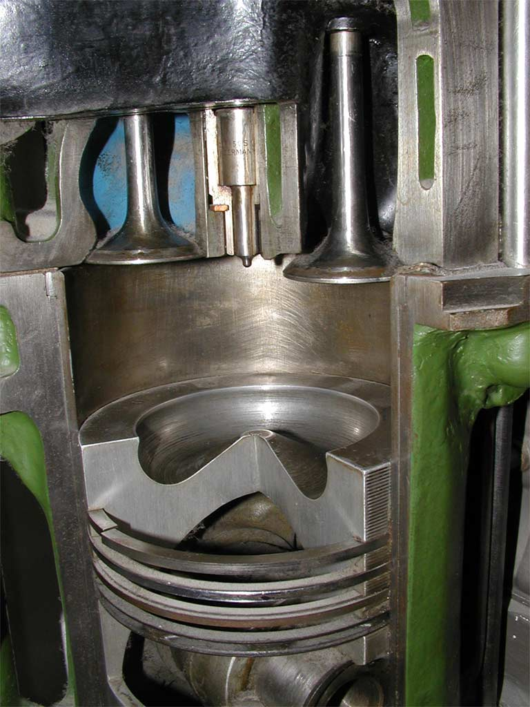 Direkteinspritzung